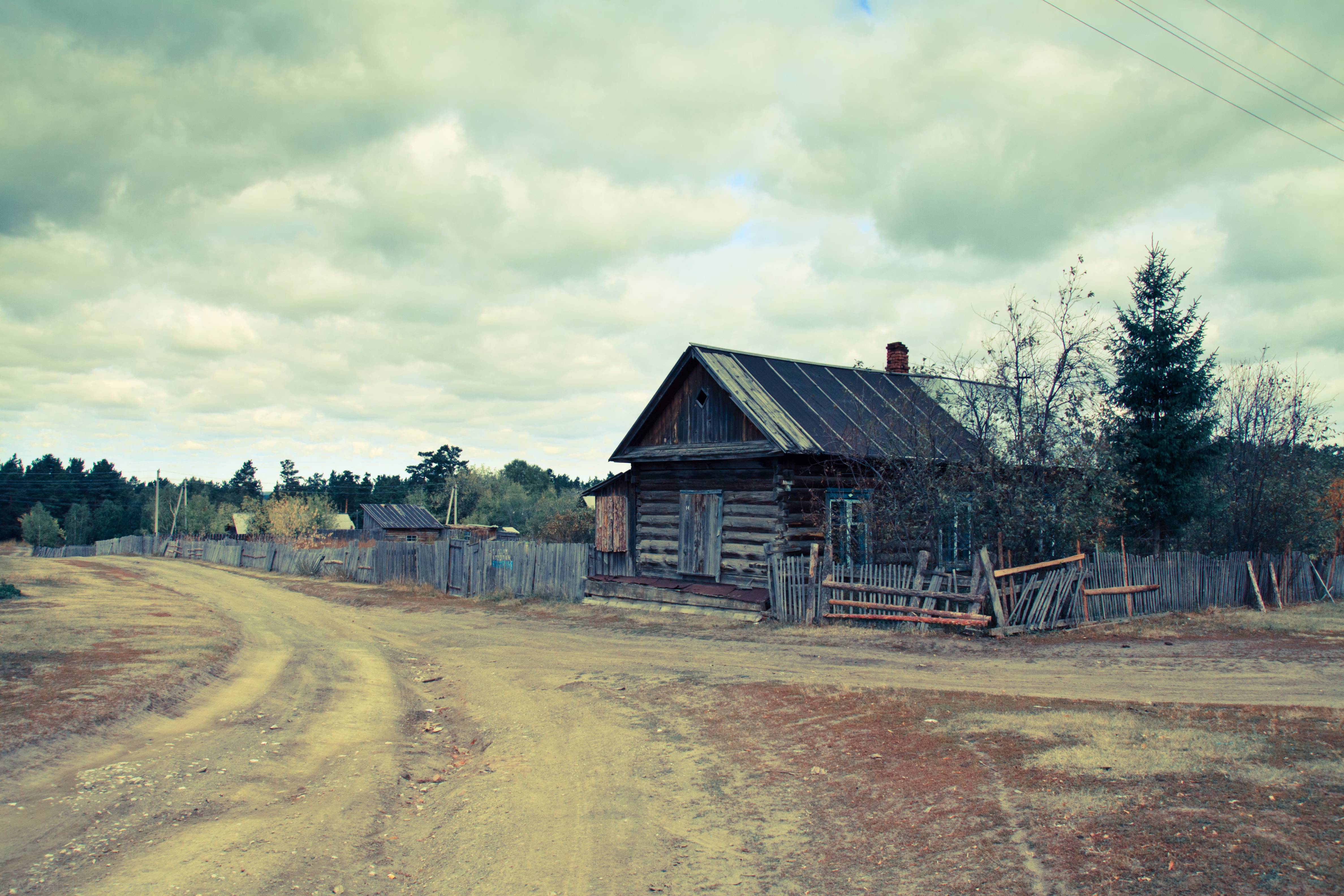 Taken in Nizhnekamenka, Novosibirsk Oblast